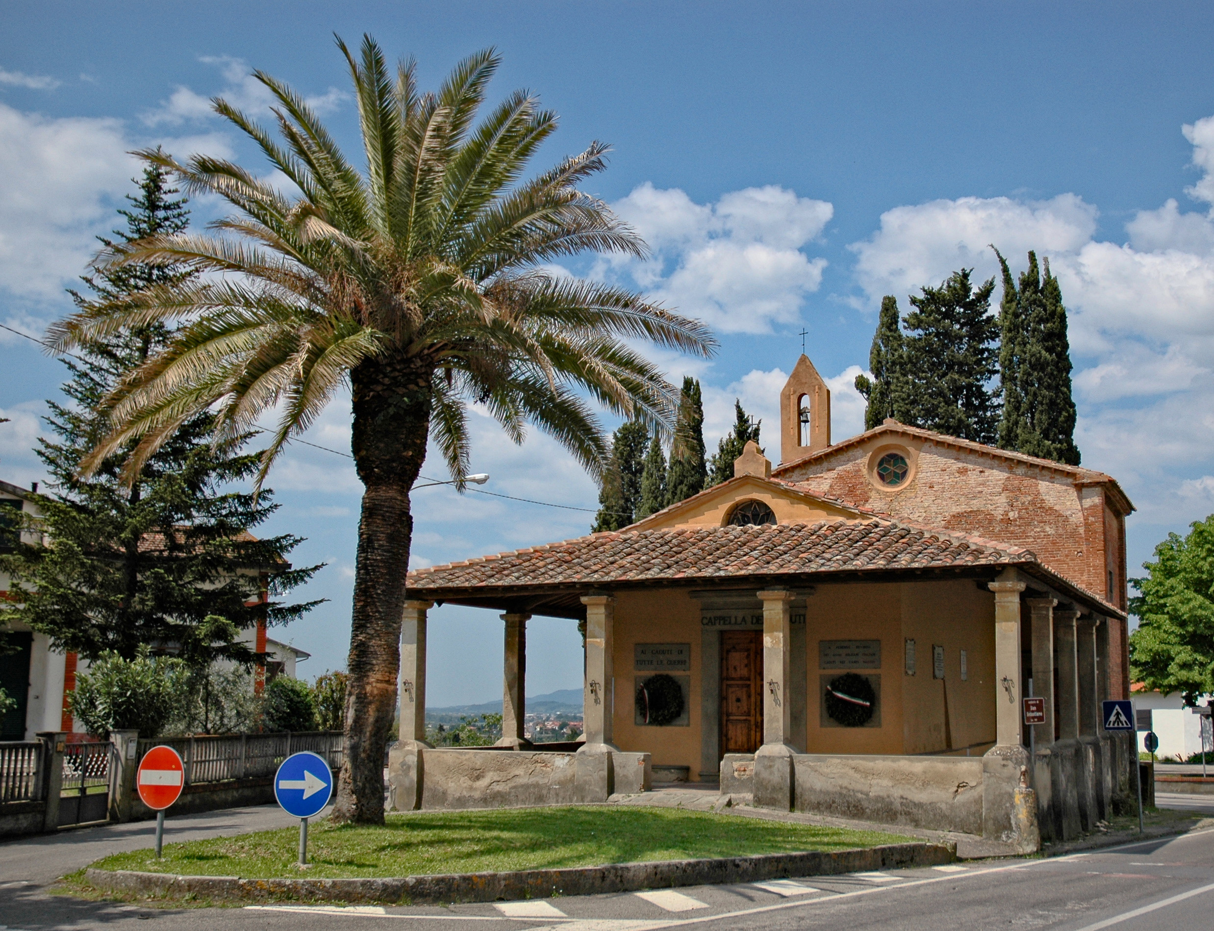 Chapel 'Oratorio di San Sebastiano' in Montopoli / Italy